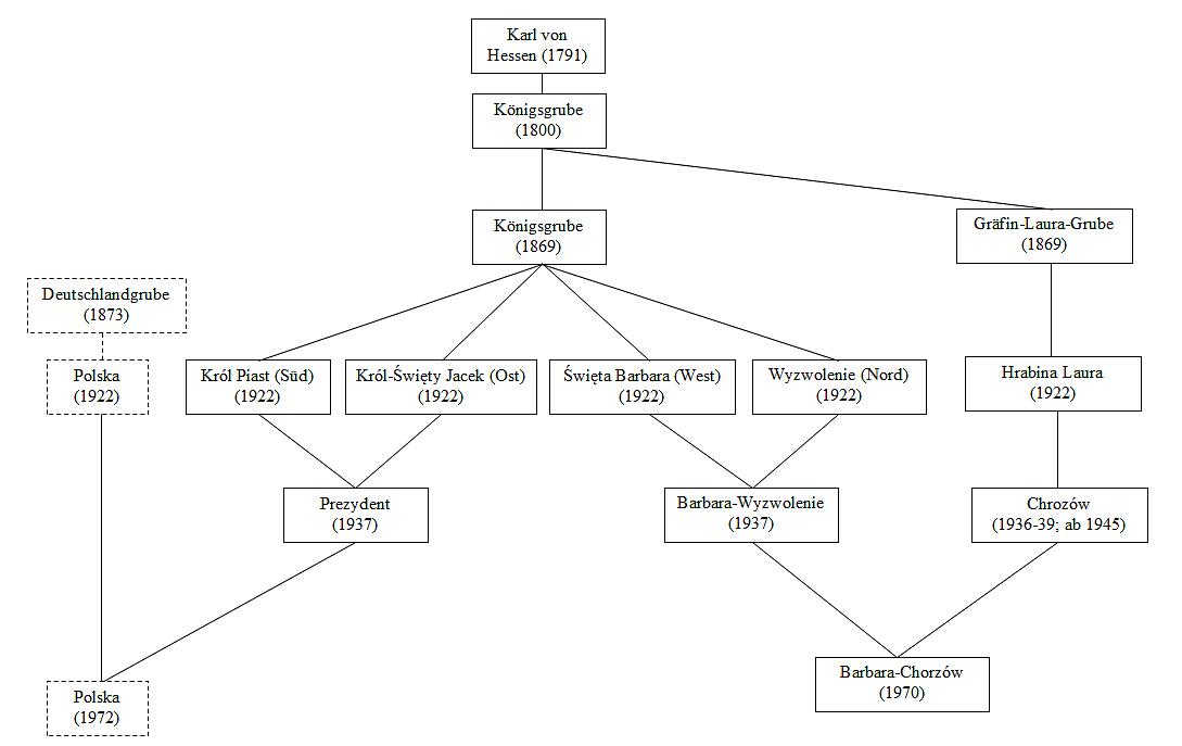 Abspaltung und Fusionen von KWK Król